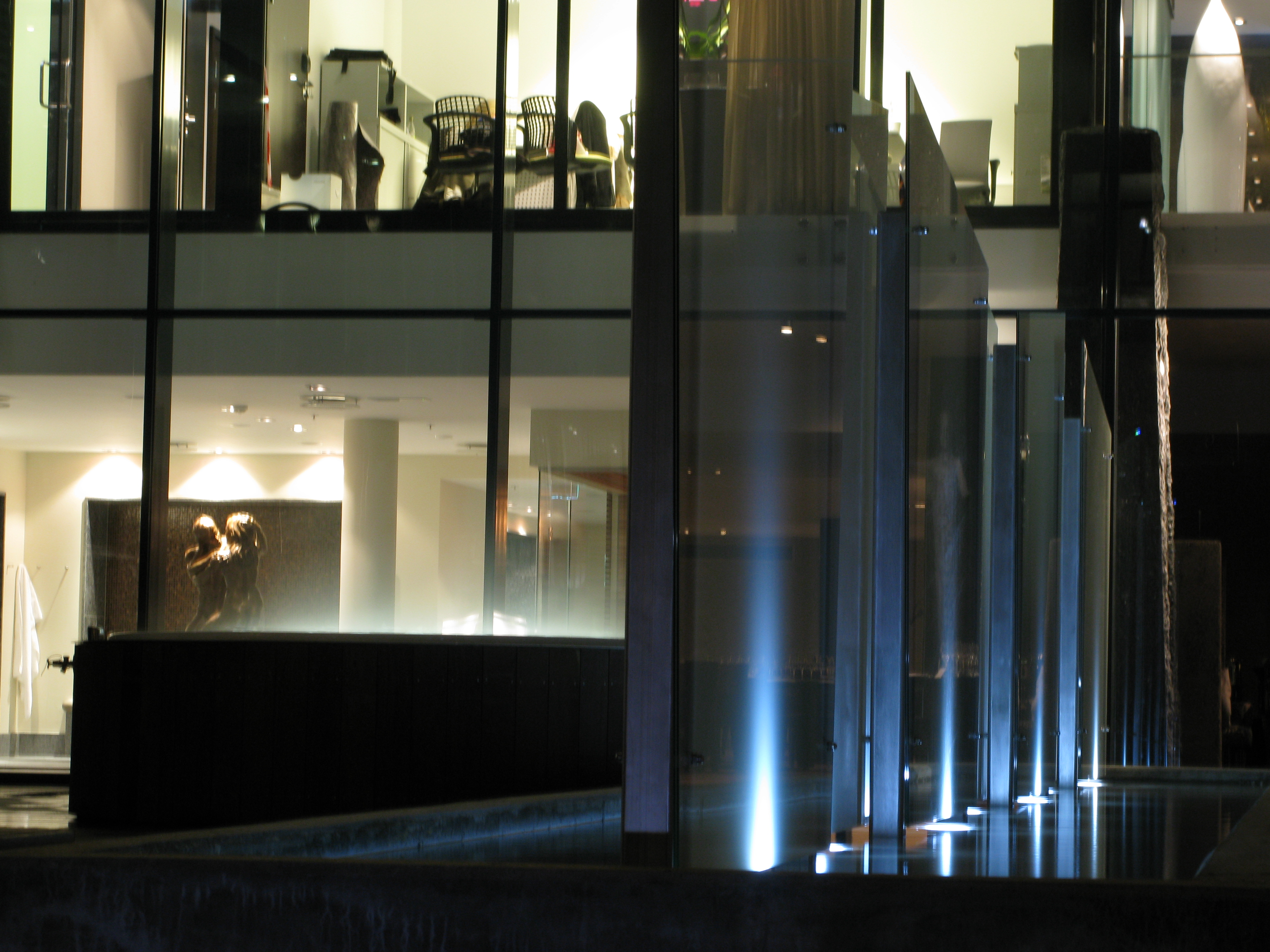 Uteområdet er tegnet av landskapsarkitekt Gullik Gulliksen AS